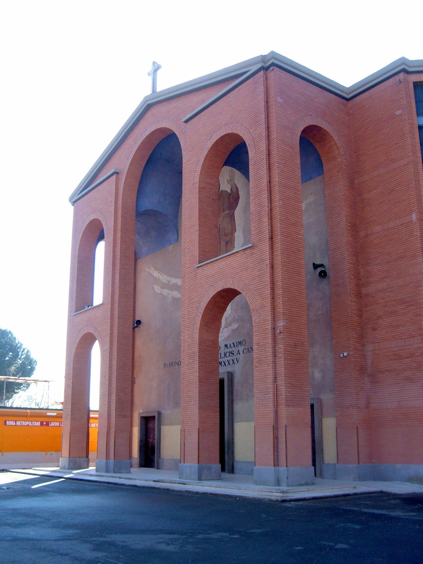 Chiesa di San Felice da Cantalice, a Roma, nel quartiere Prenestino-Centocelle.